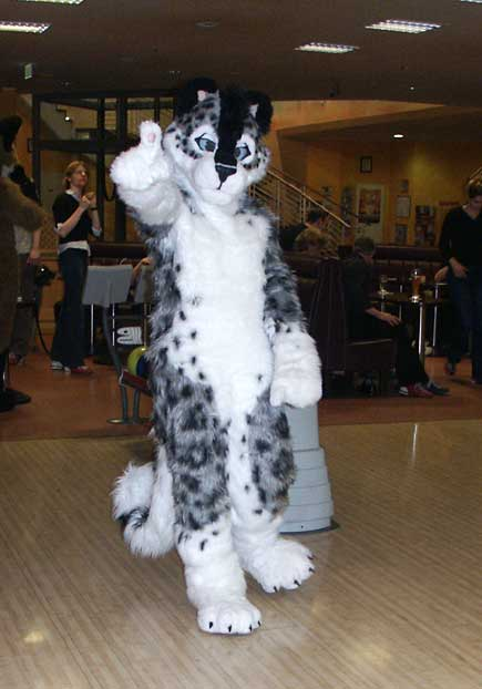 TaniDaReal in a Fursuit